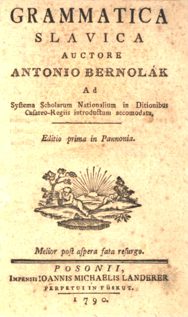 Titulná strana diela Grammatica Slavica od Antona Bernoláka (1790).